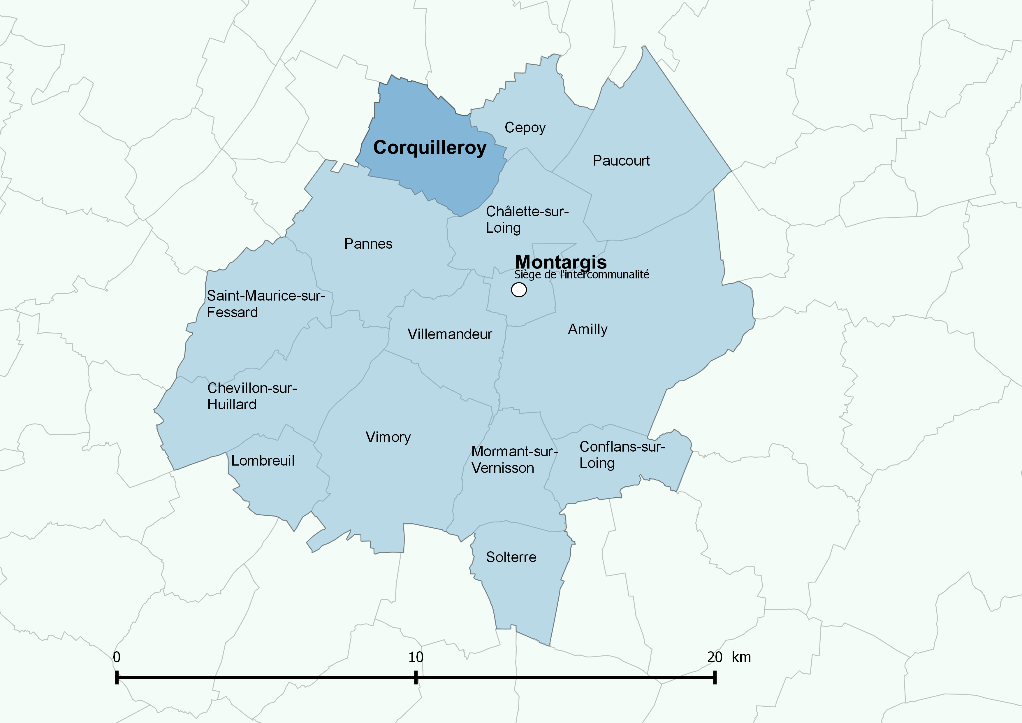 Périmètre de l'Agglomération montargoise et rives du Loing - Positionnement de la commune de Corquilleroy